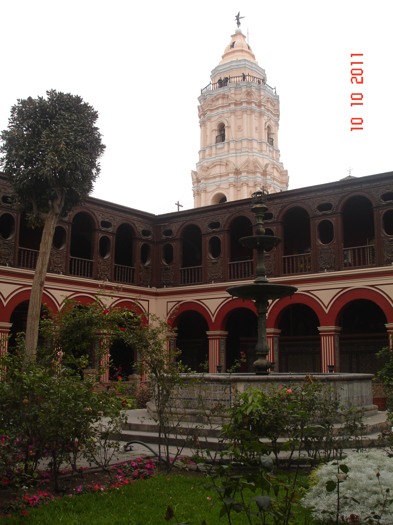 Convento de Santa Domingo, en Lima